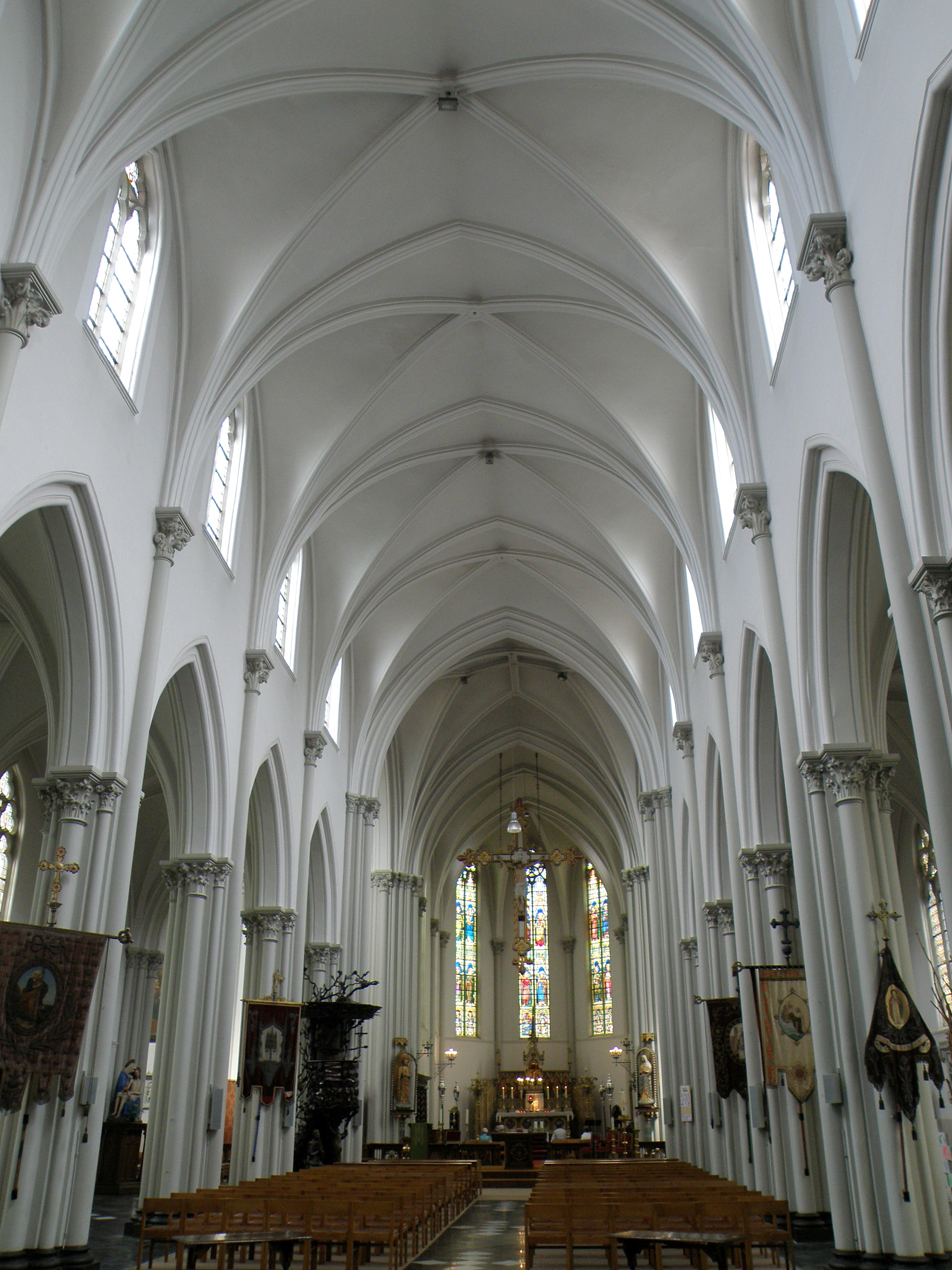 Rumst (prov. Antwerpen, België). Sint-Pieterskerk.